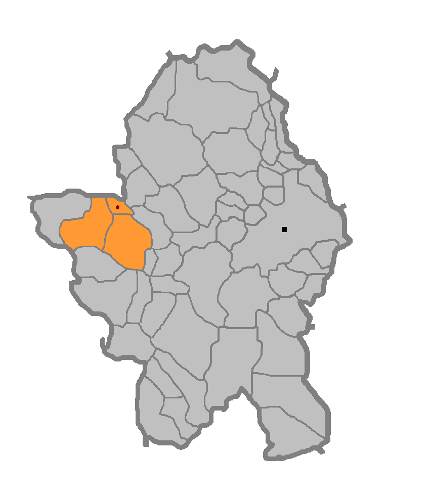 Мјесна заједница Бронзани Мајдан